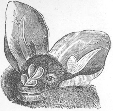 Bat face, Megaderma spasma